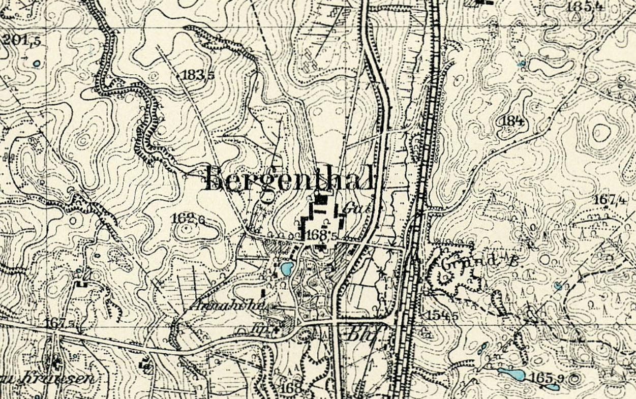 Messtischblatt Rothfließ Nr. 722